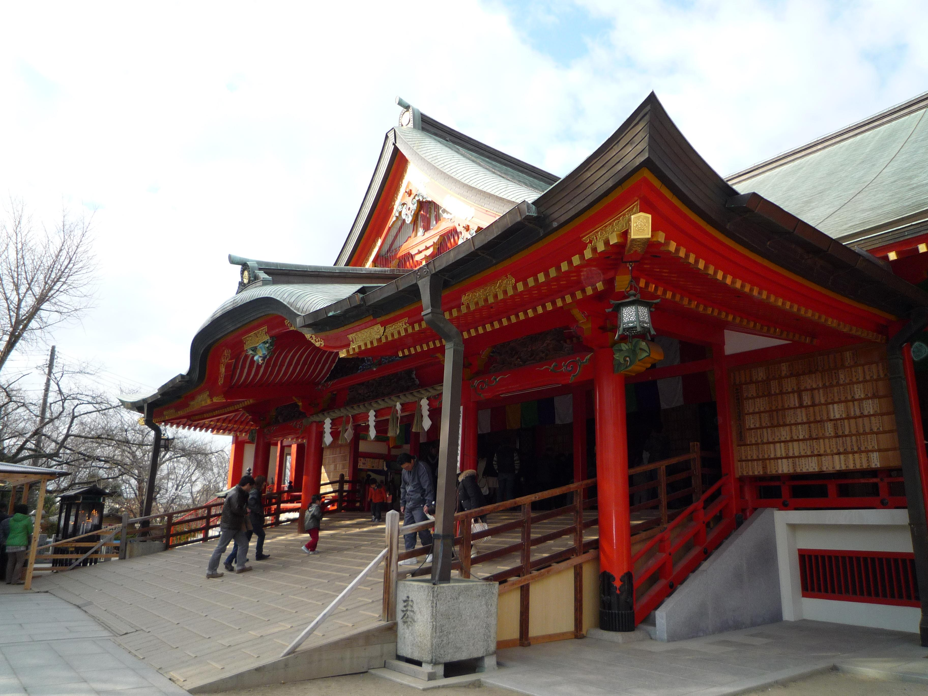 成田山不動尊